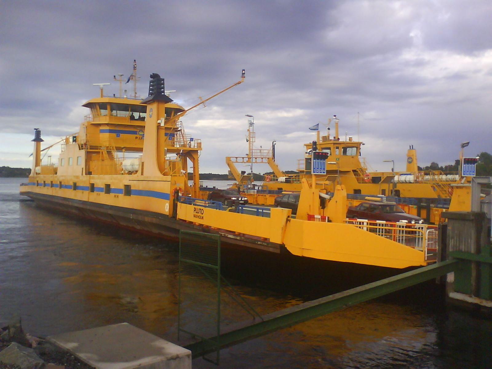 Vägfärjan Pluto som trafikerar sträckan Öregrund-Gräsö.